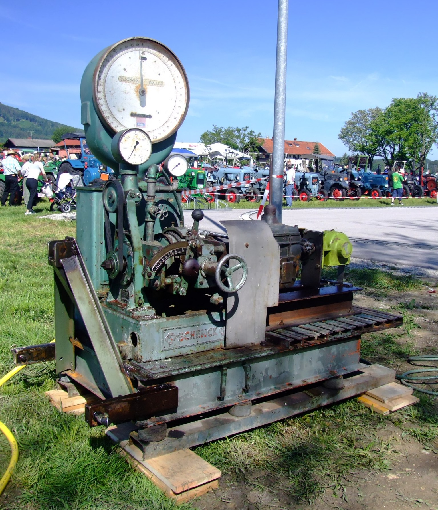 Drehmomentwaage Carl Schenck, Maschinenfabrik GmbH, Darmstadt Baujahr: 1955 Quelle: selbst fotografiert, 05/2007 Fotograf: Späth Chr.